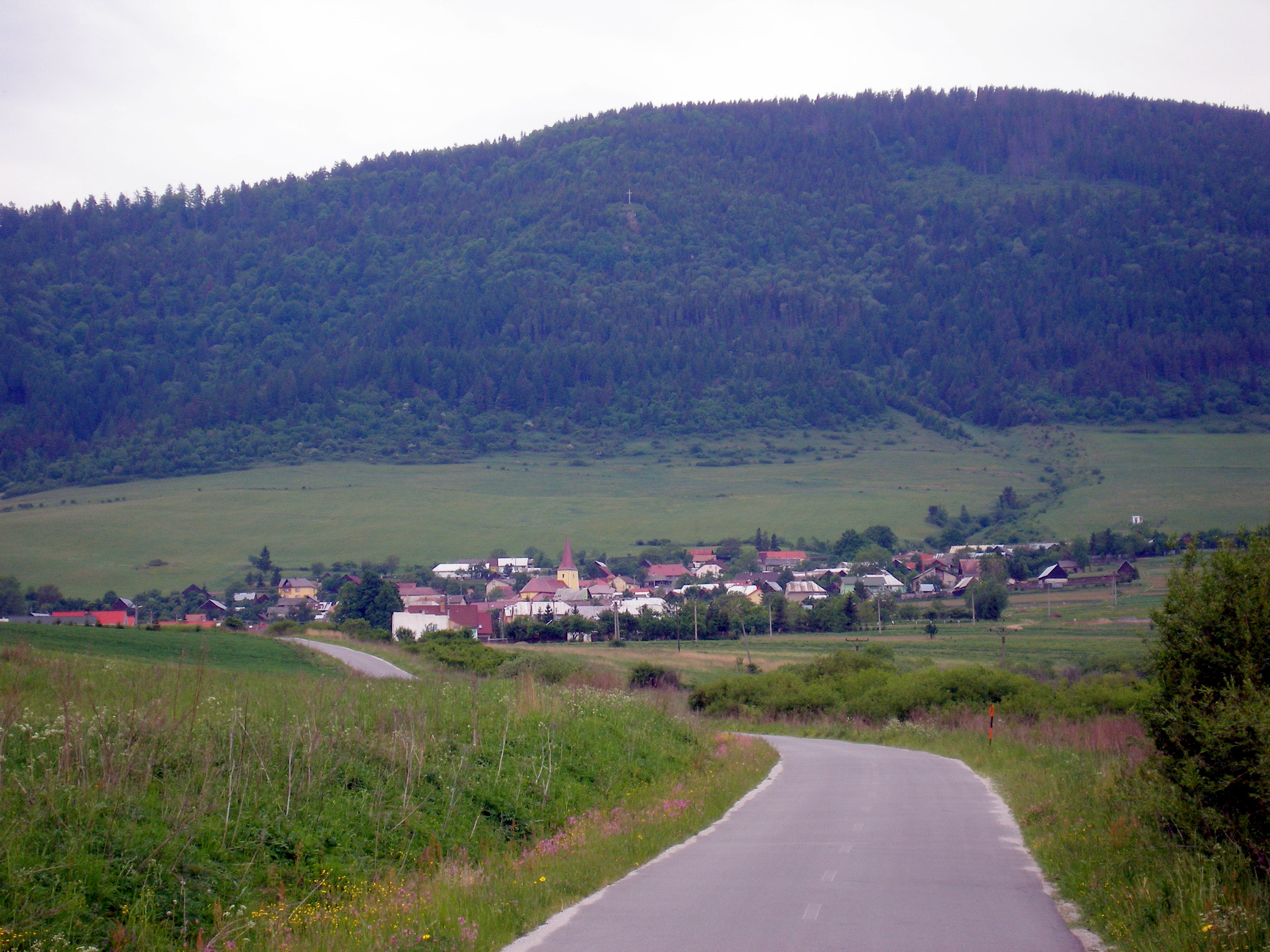 Obec Poloma okres Sabinov